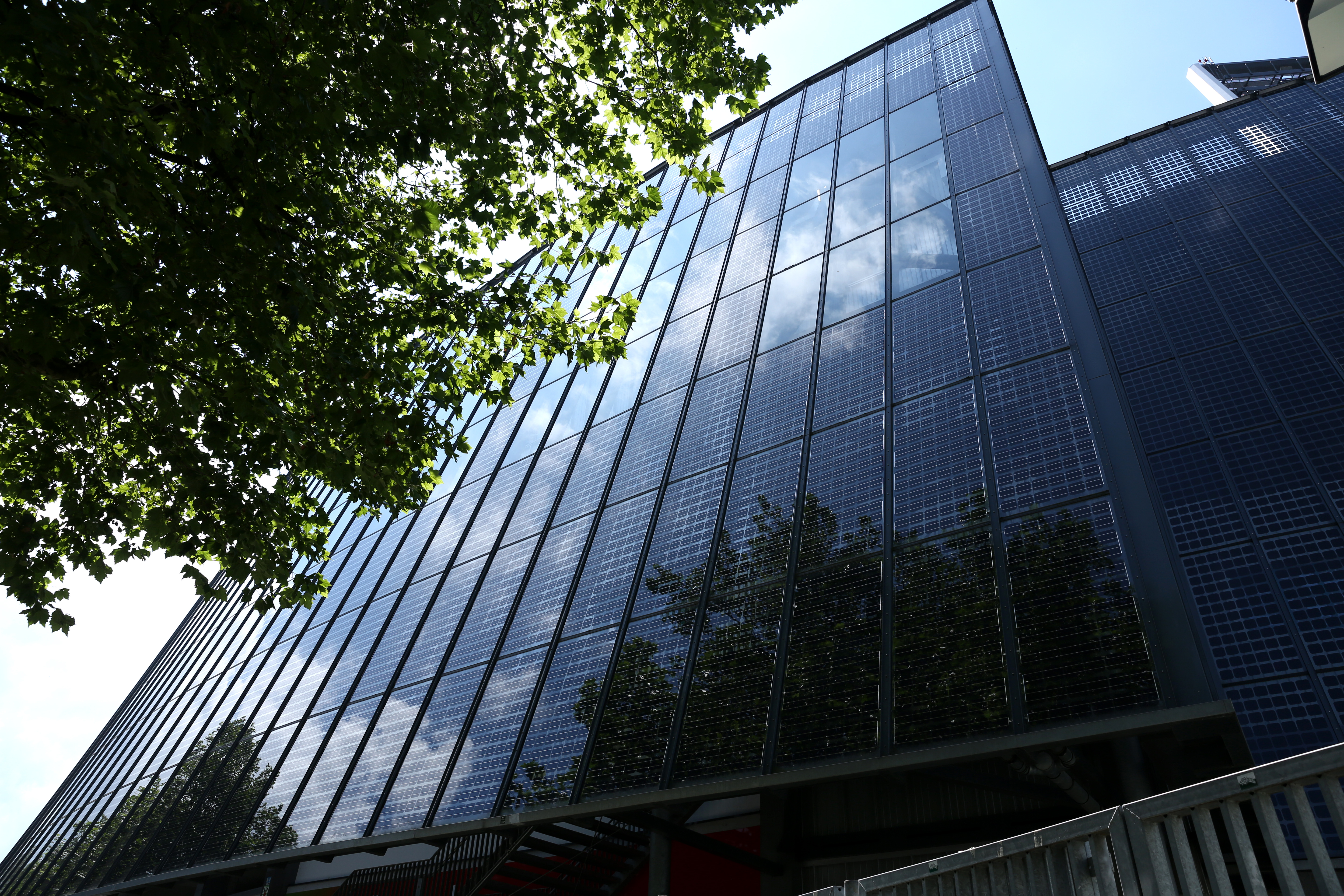 Weser Stadion Photovoltaikanlage, Außenseite.